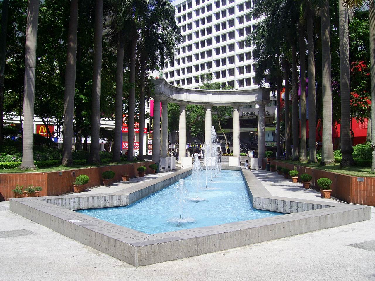 中文（香港）: 市政局百週年紀念花園